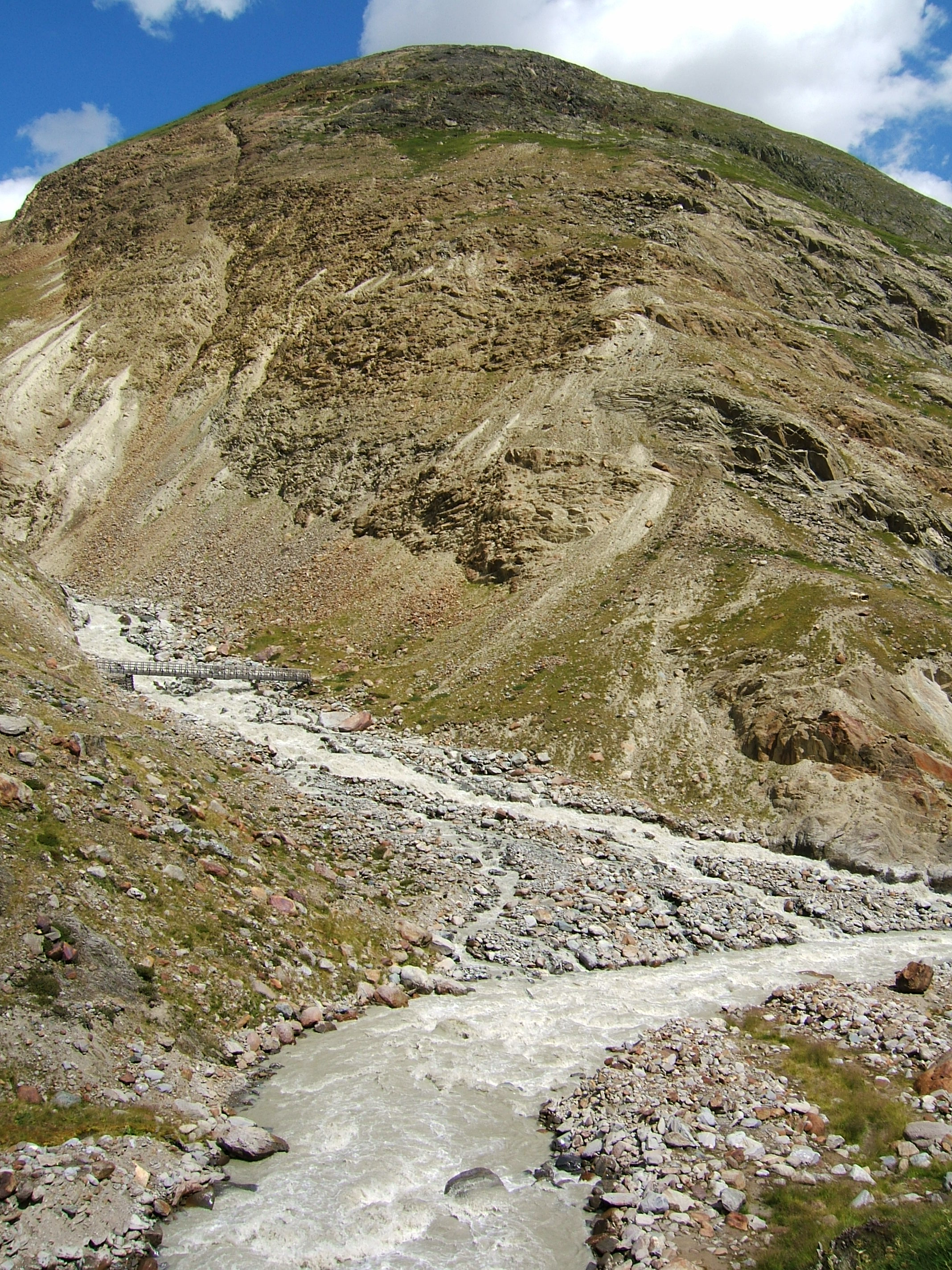 Mündung des Vernagtbachs in die Rofenache (vorn). Position des ehemaligen Rofener Eissees.